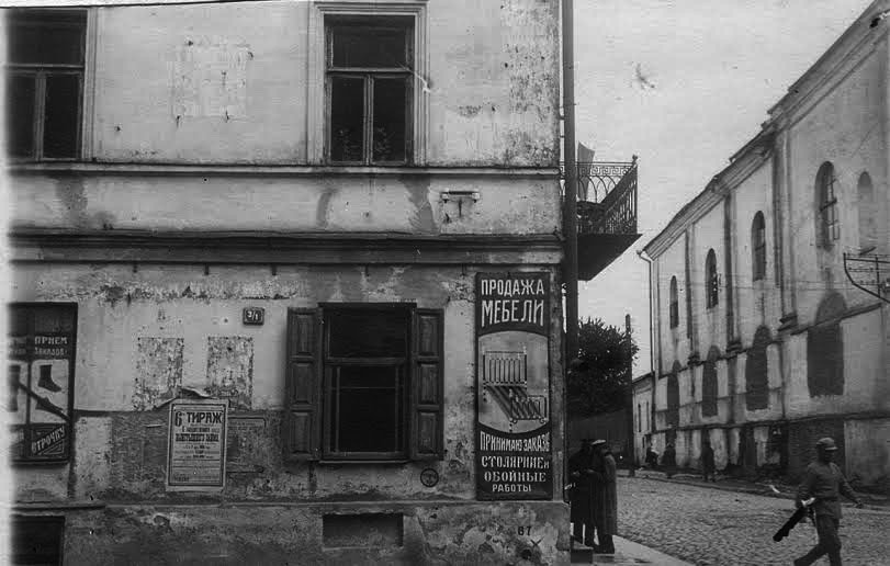 Беларуская (тарашкевіца): Менск (Miensk), рог вуліц Дамініканскай (vulica Daminikanskaja) і Валоцкай (vulica Vałockaja)